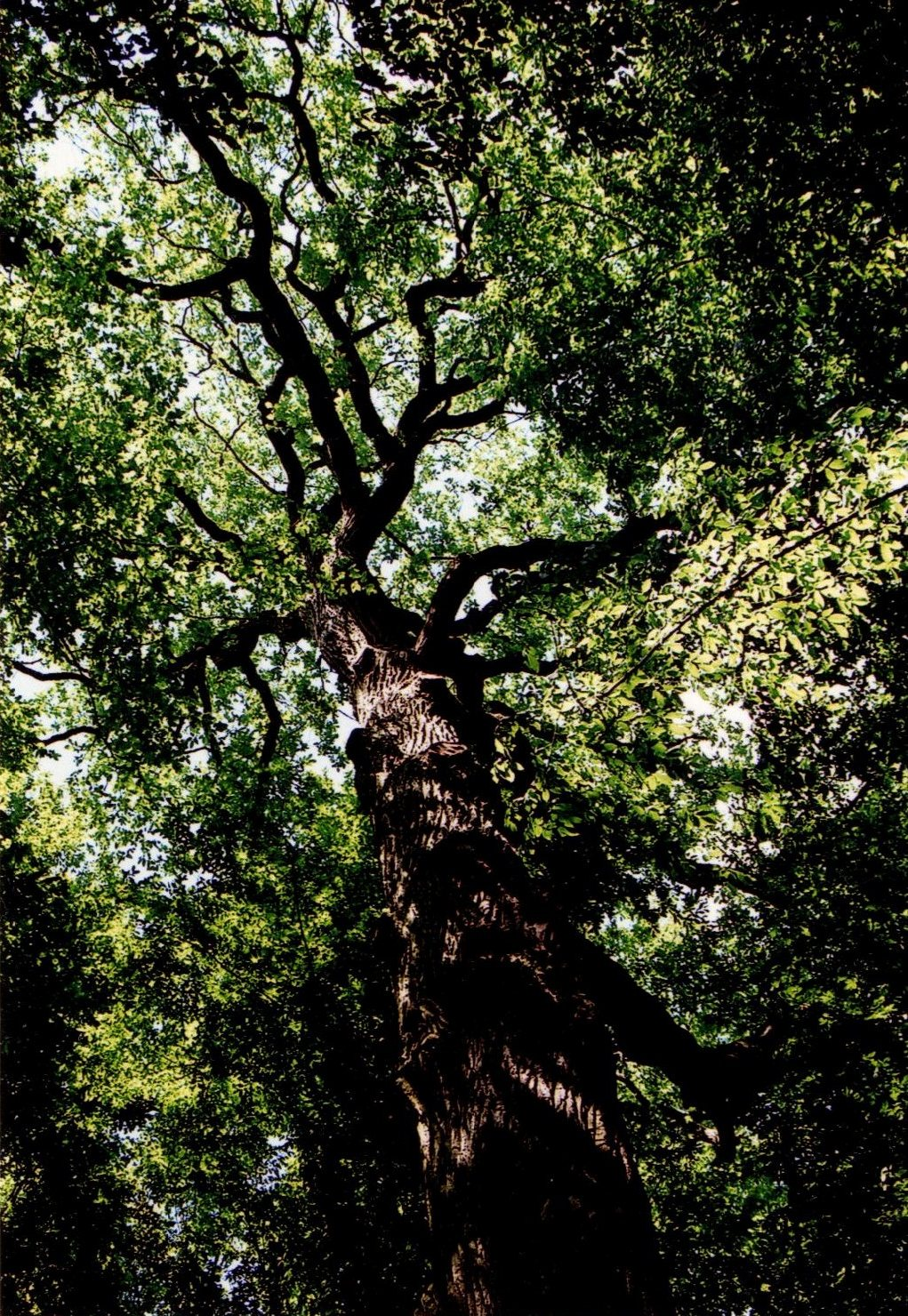 Autor: Adrian Grzegorz Rok wykonania: 2001